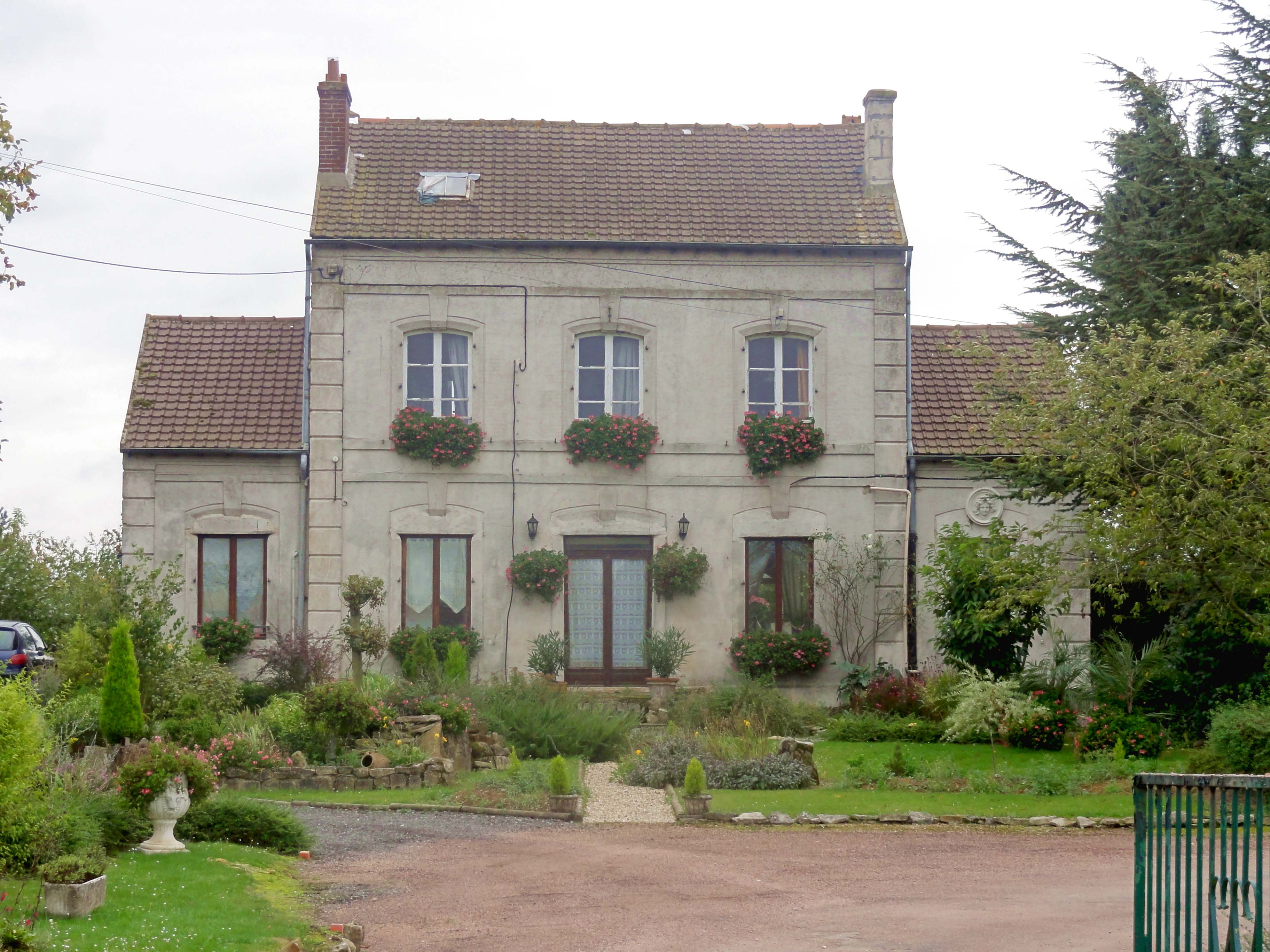 Ancienne gare, bâtiment-voyageurs côté nord.